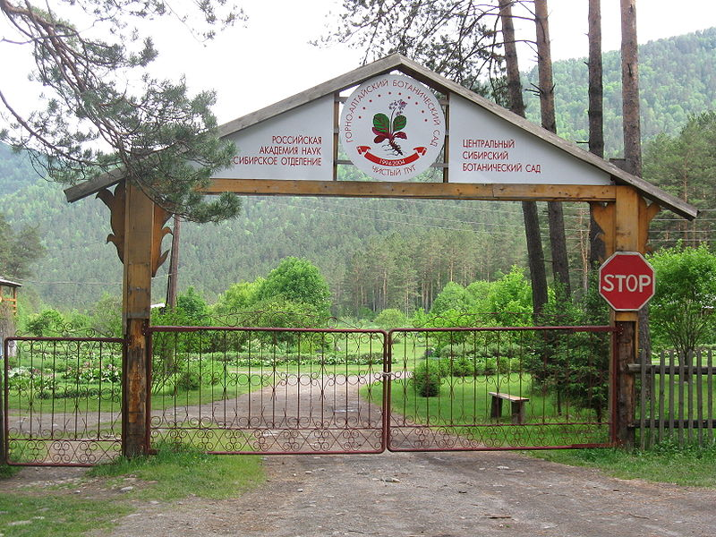 Gates Gorno-Altai Botanical Gardens